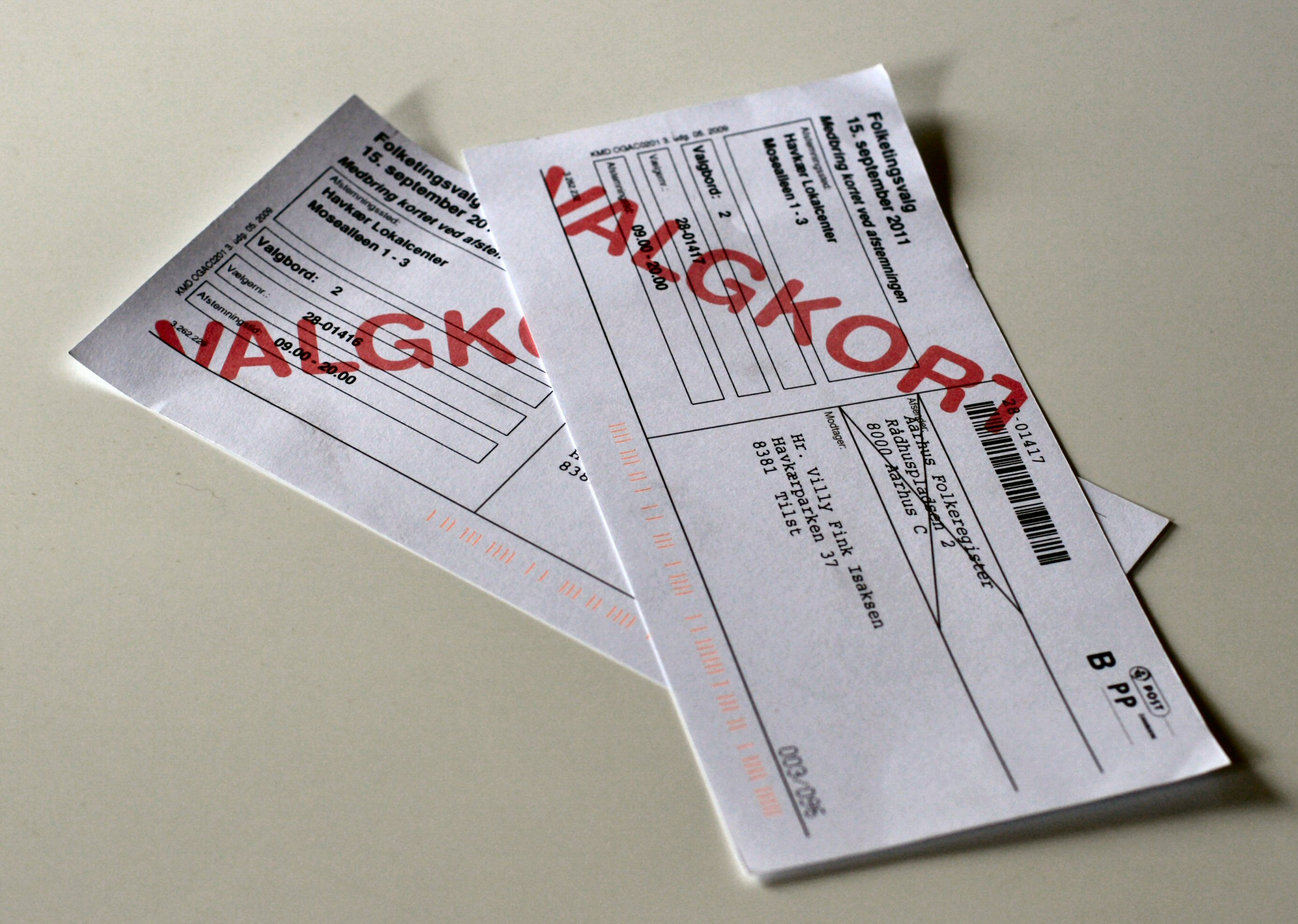 Valgkort til Folketingsvalget 15. september 2011